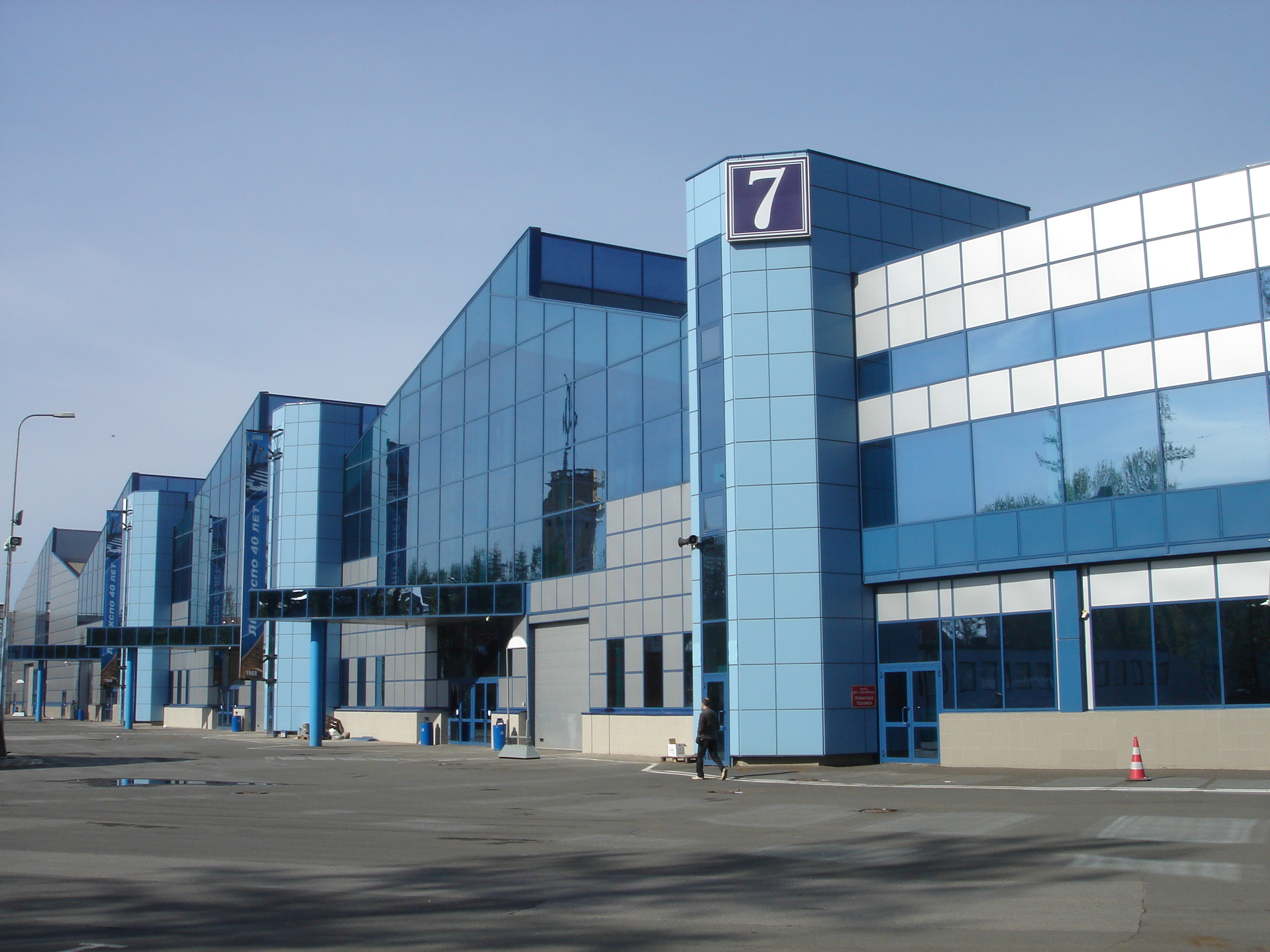 Площадка "Ленэкспо" в Санкт-Петербурге. 7 павильон и павильон 8а (на фоне).